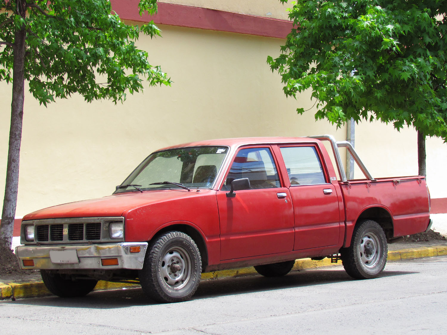 1988 Chevrolet LUV DLX 1600, photographed in Chile